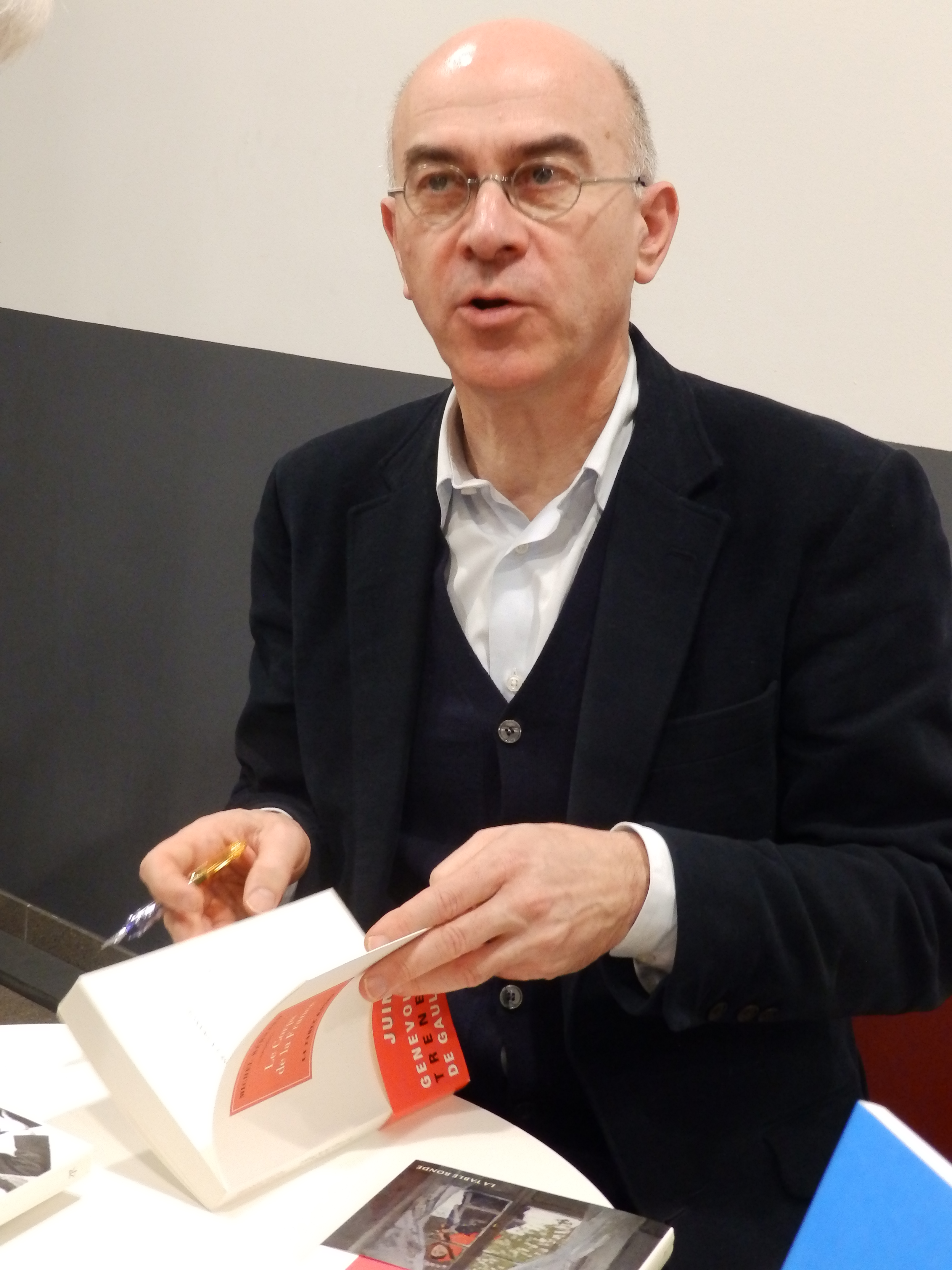 L'écrivain Michel Bernard en dédicace à la bmi d’Épinal à l'occasion d'une conférence sur Maurice Genevoix, novembre 2016